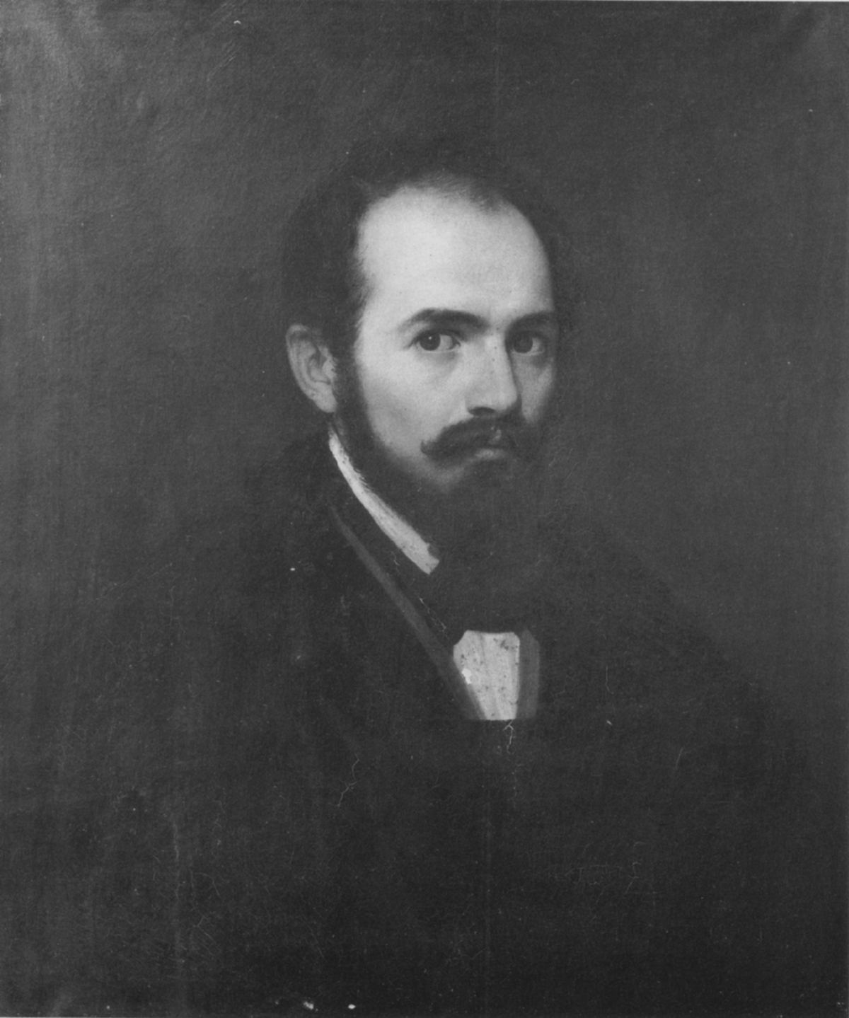 Francesco Podesti, Ritratto di Achille Calzi Senior., Pinacoteca Comunale Faenza, inv. n. 817, Foto realizzate a cura dell’Istituto per i Beni Artistici Culturali e Naturali della Regione Emilia-Romagna nell’ambito delle attività di catalogazione finanziate dalla Legge Regionale 18/2000.